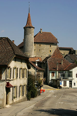 Le château à Boudry